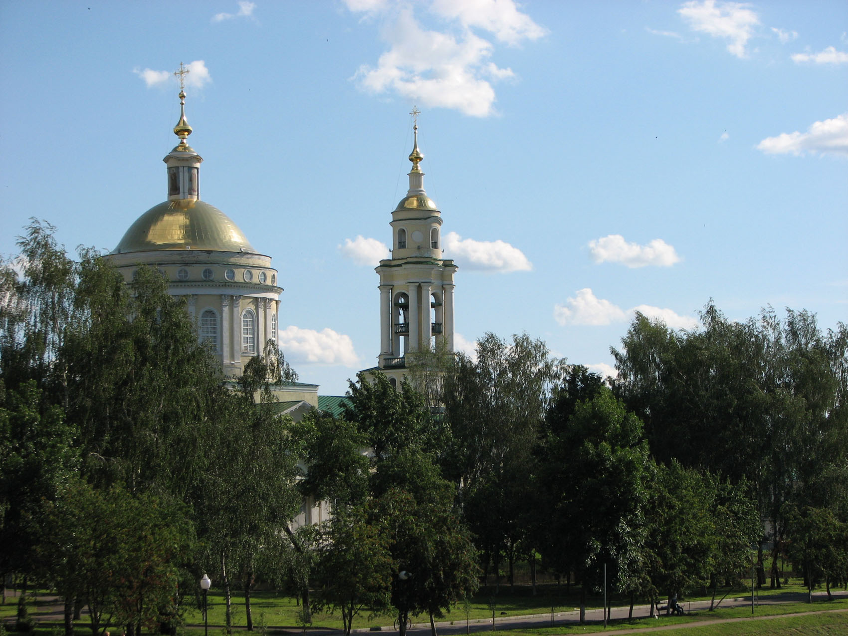 г. Орёл